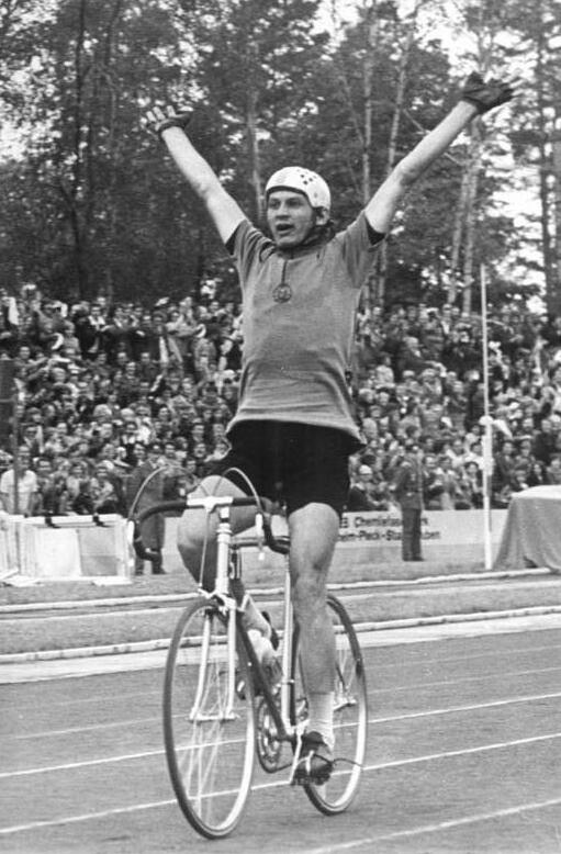 Bernd Drogan ADN-ZB Reiche 15.5.77-mo Cottbus: 30. Internationale Friedensfahrt. Sieger der 8. Etappe Berlin Cottbus (132 Kilometer) am 15.5. wurde der Cottbuser Bernd Drogan, der von dem 25.000 Zuschauern im Cottbuser Max-Reimann-Stadion stürmisch gefeiert wurde. Abgebildete Personen: Drogan, Bernd: Radrennfahrer, Friedensfahrtteilnehmer, DDR